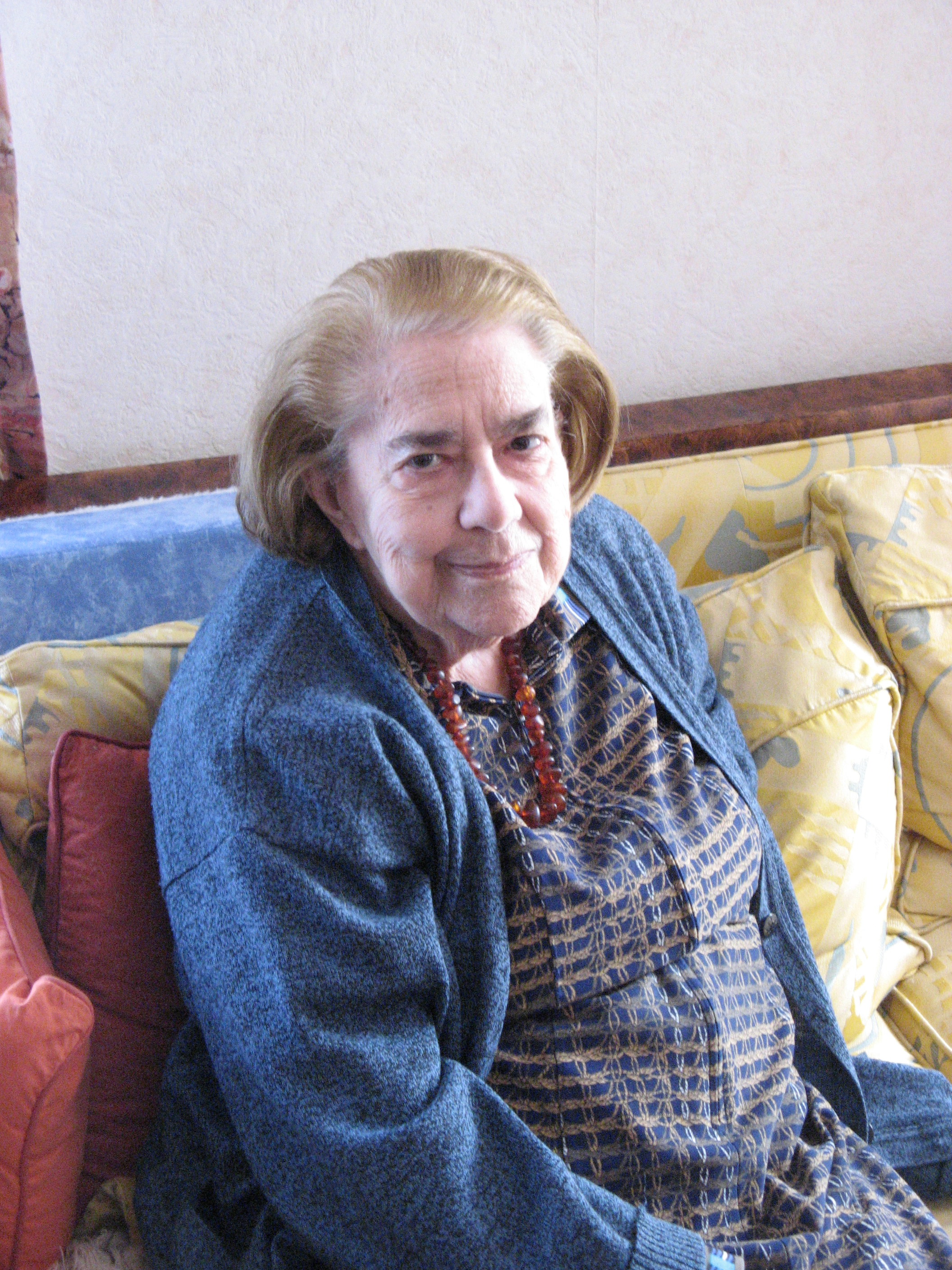 Jeanne Joulain à Lille en 2008